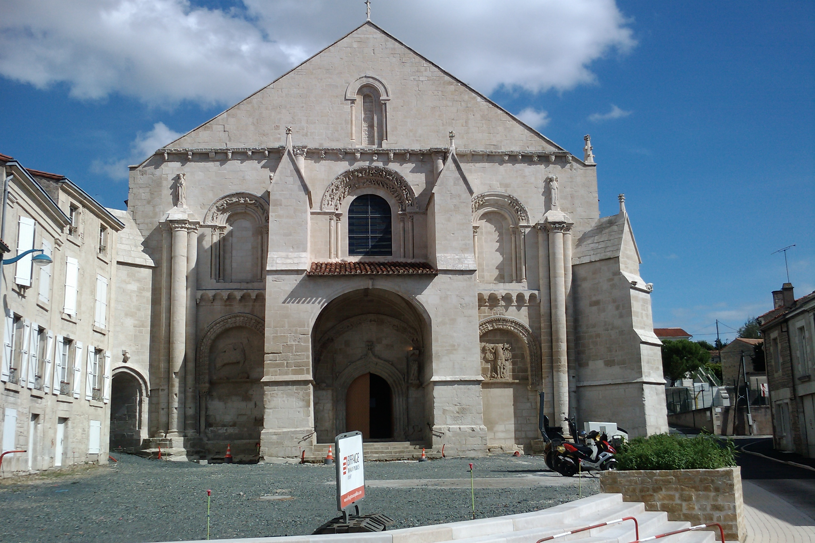 Église Sainte-Eulalie de Benet